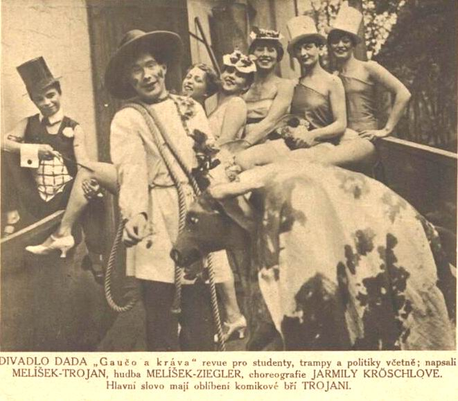 Divadlo Dada, 1928, Gaučo a kráva